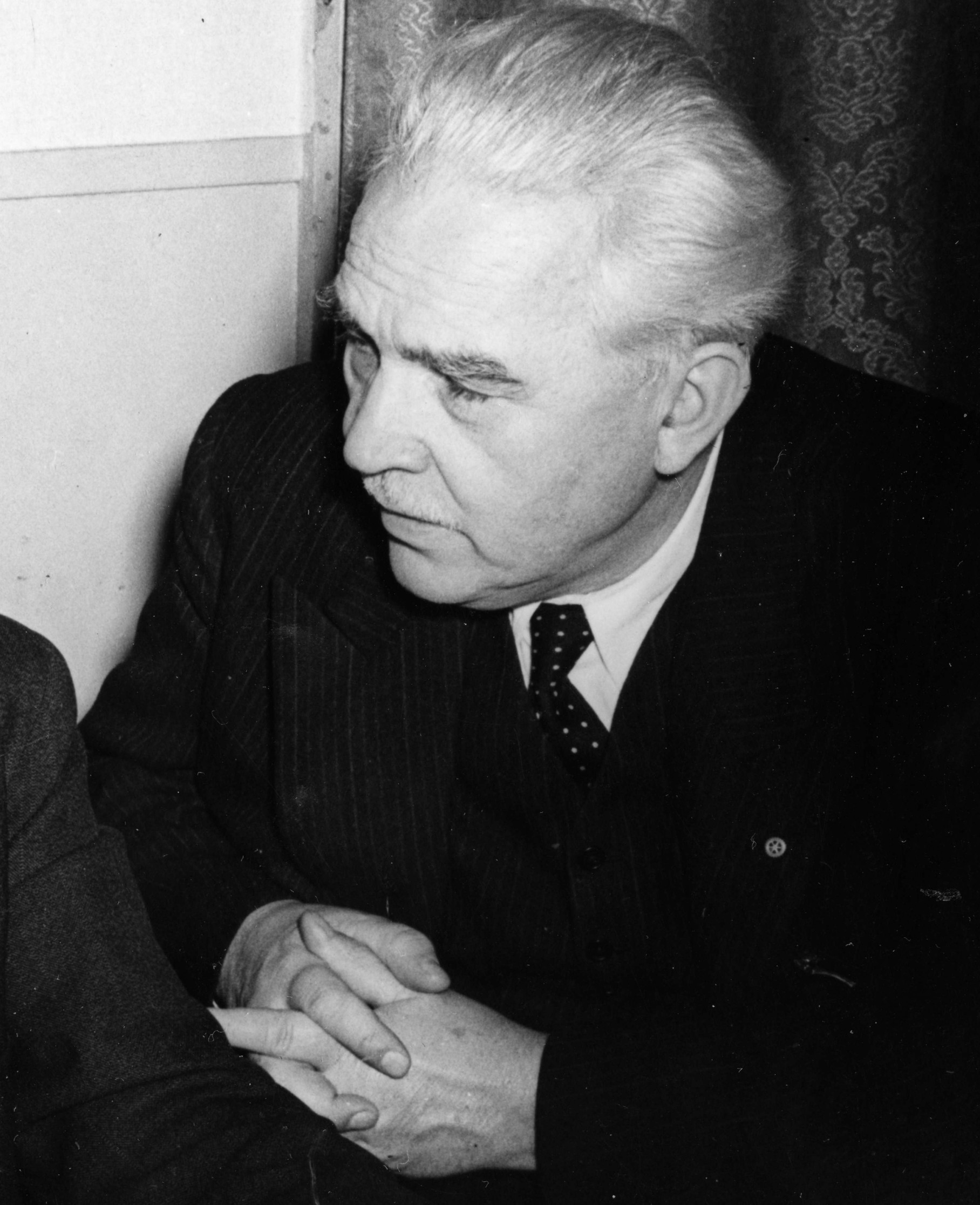 Porträtt av byggmästaren Anders Diös.